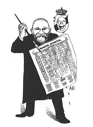 Pehr Staaff (1856-1903). Caricature.